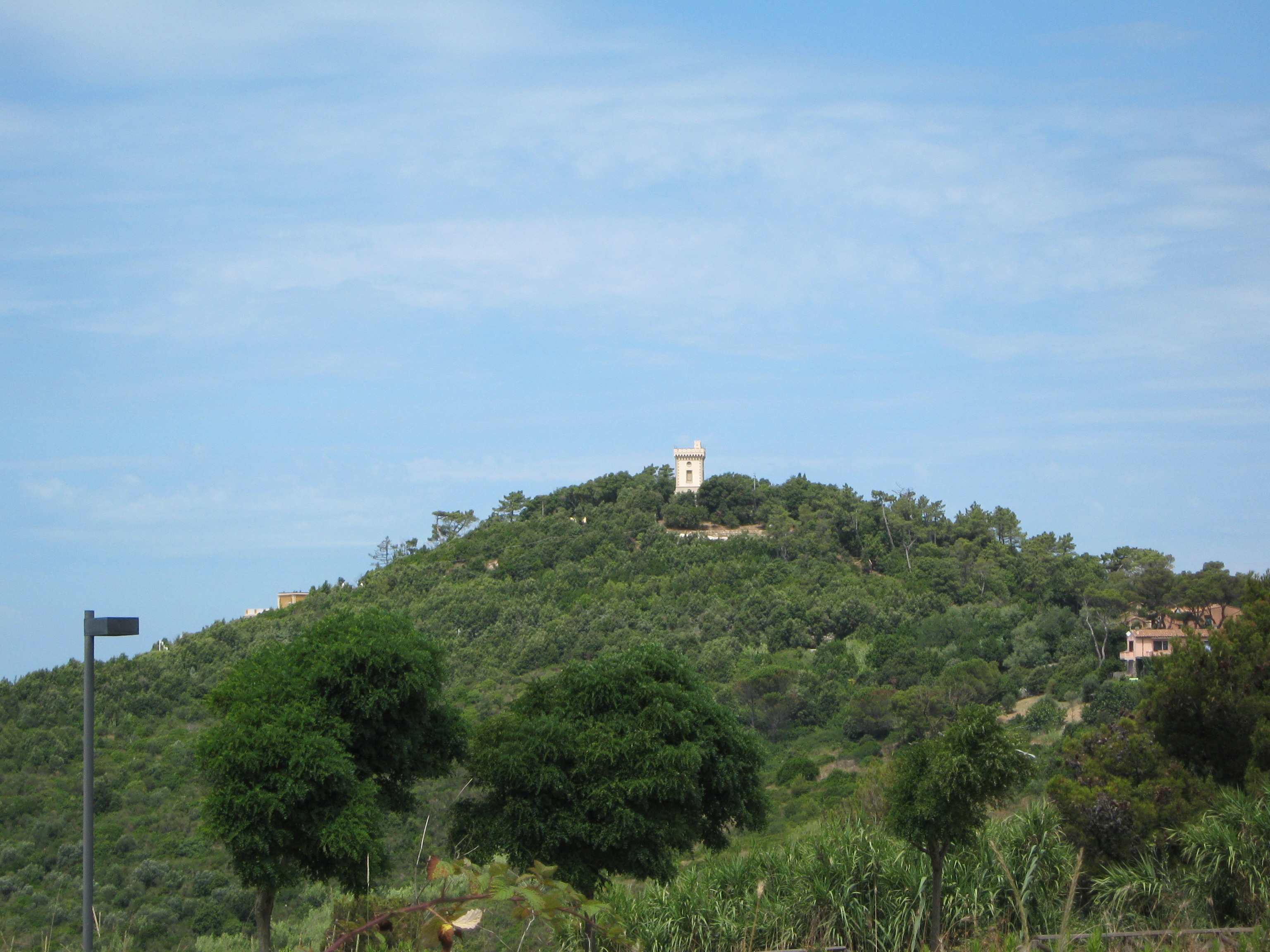 Livorno: frazione di Castellaccio. Sullo sfondo la torre neomedievale di Castel d'Oreto (noto anche come Villa Grower o Villa Pavolini)